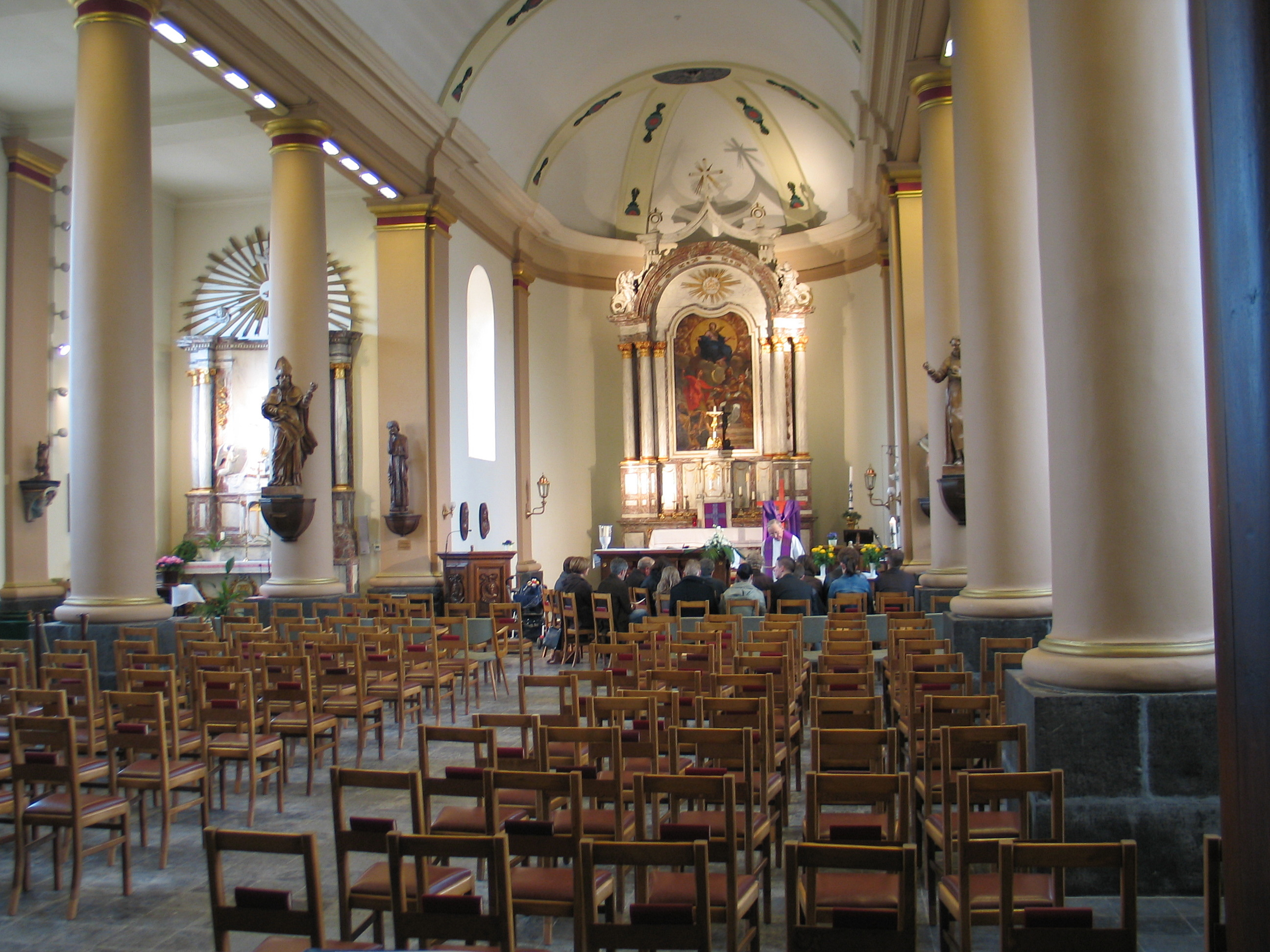 Interieur Sint-Agapituskerk Vliermaal, België